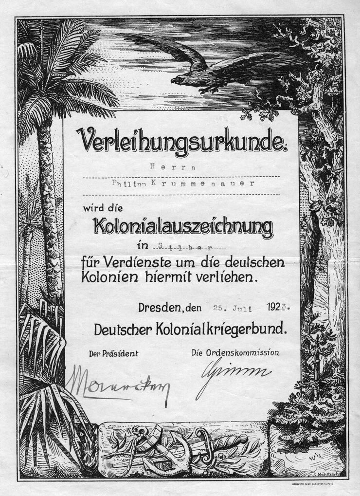 Löwenorden, Verleihungsurkunde